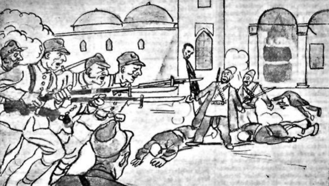 Vakit gazetesinde yer alan Menemen Olayı çizimi.